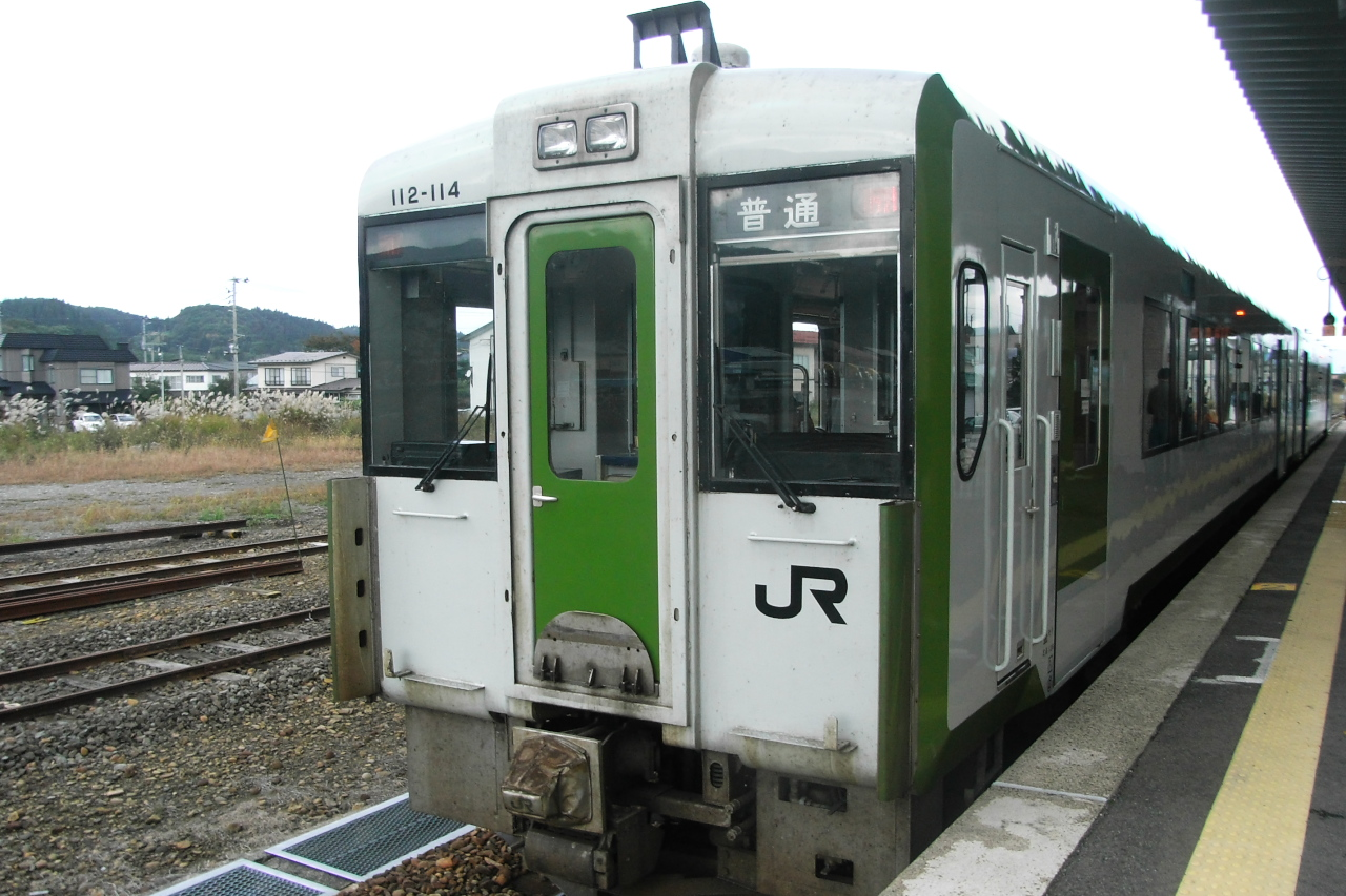 途中、陸中花輪駅でまた上下の列車交換の合間に。ここのところ割と見慣れたキハ110形です。キハ40とキハ110にはお世話になってます。